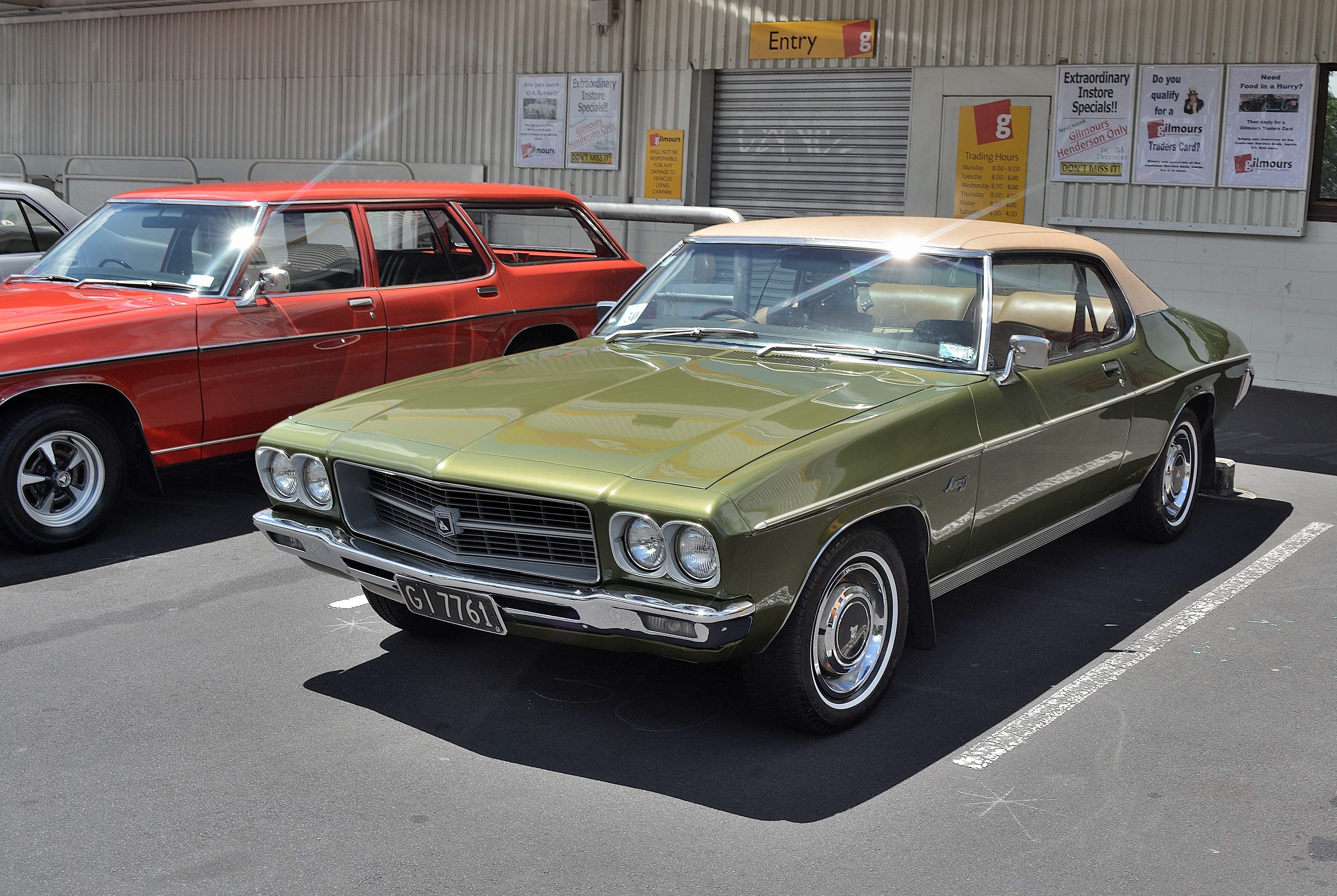 Henderson,West City Holden.Auckland.New Zealand